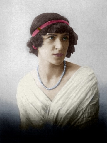 Jadwiga Długoborska z Ostrowi Mazowieckiej